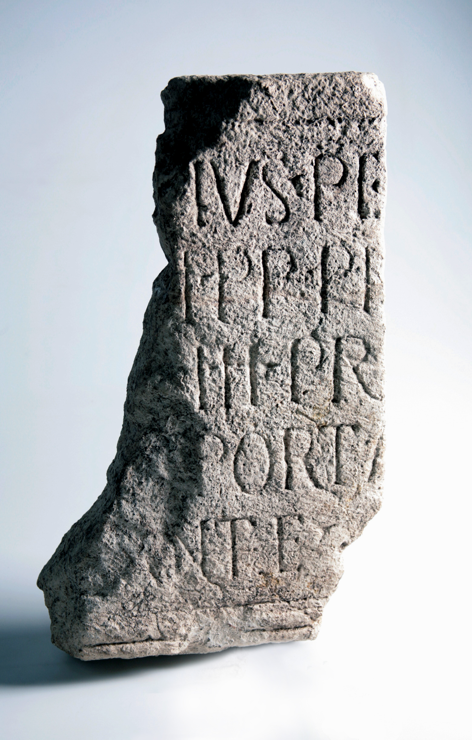 Inscription de Septime Sévère sur la porte du castellum d'Albanianae [1].